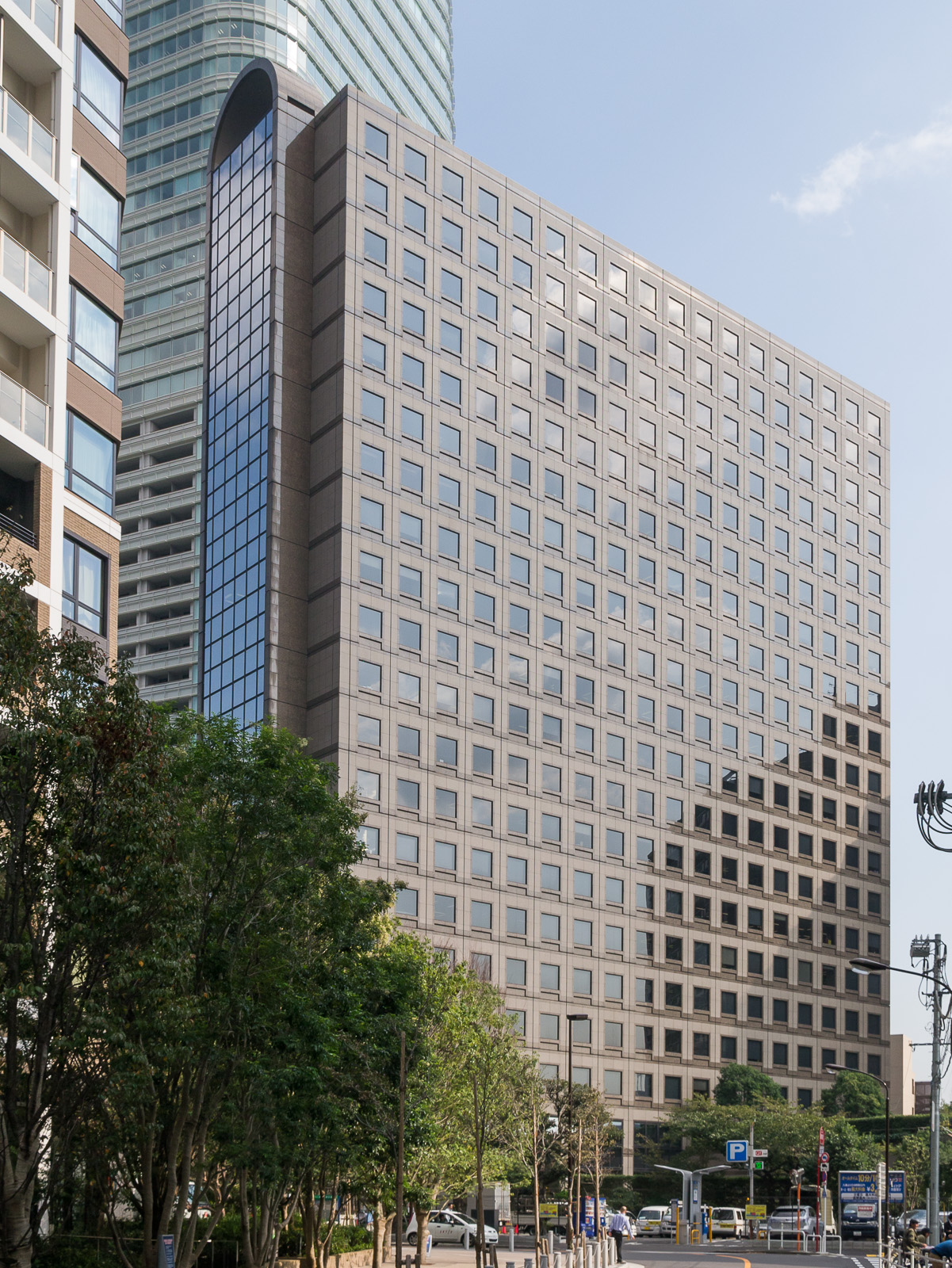 六本木ファーストビル、東京都港区六本木1-9-9。